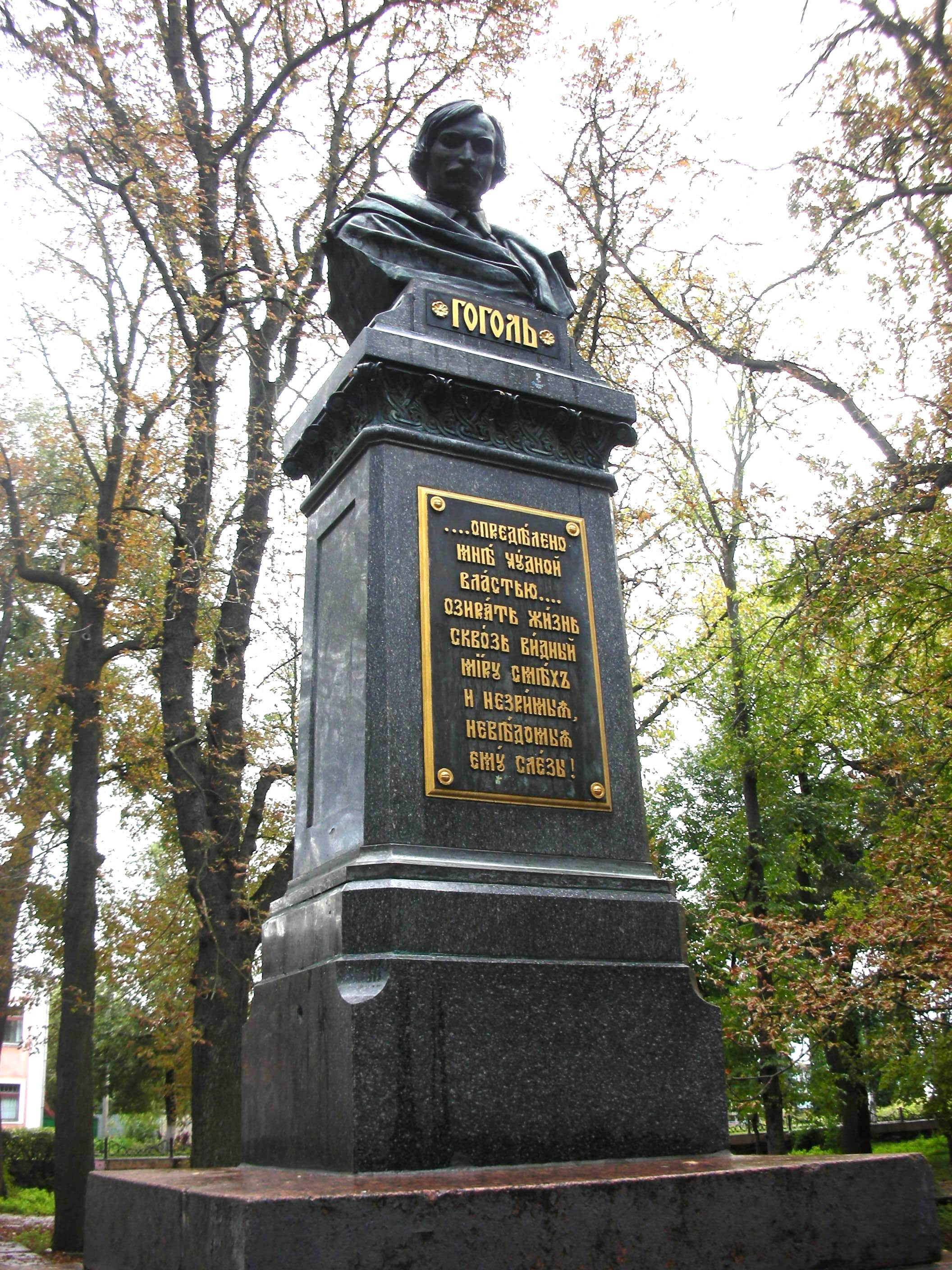 Пам'ятник письменнику М. В. Гоголю , Ніжин, парк імені М. Гоголя